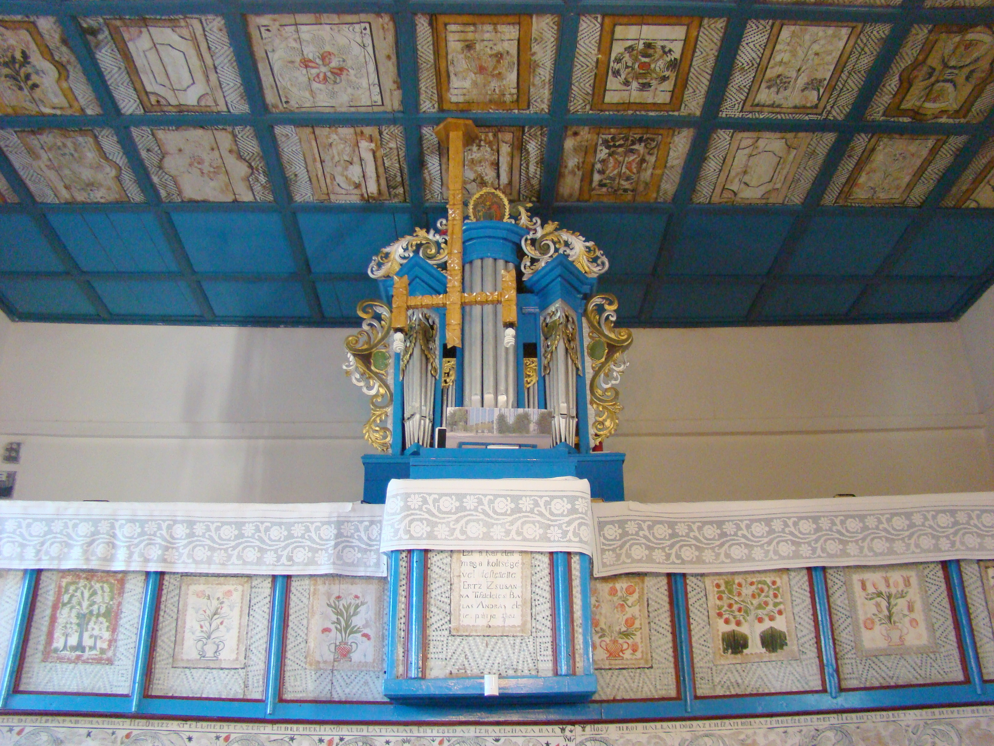 Biserica reformată, sat DUMBRAVA; comuna CĂPUŞU MARE, județul Cluj